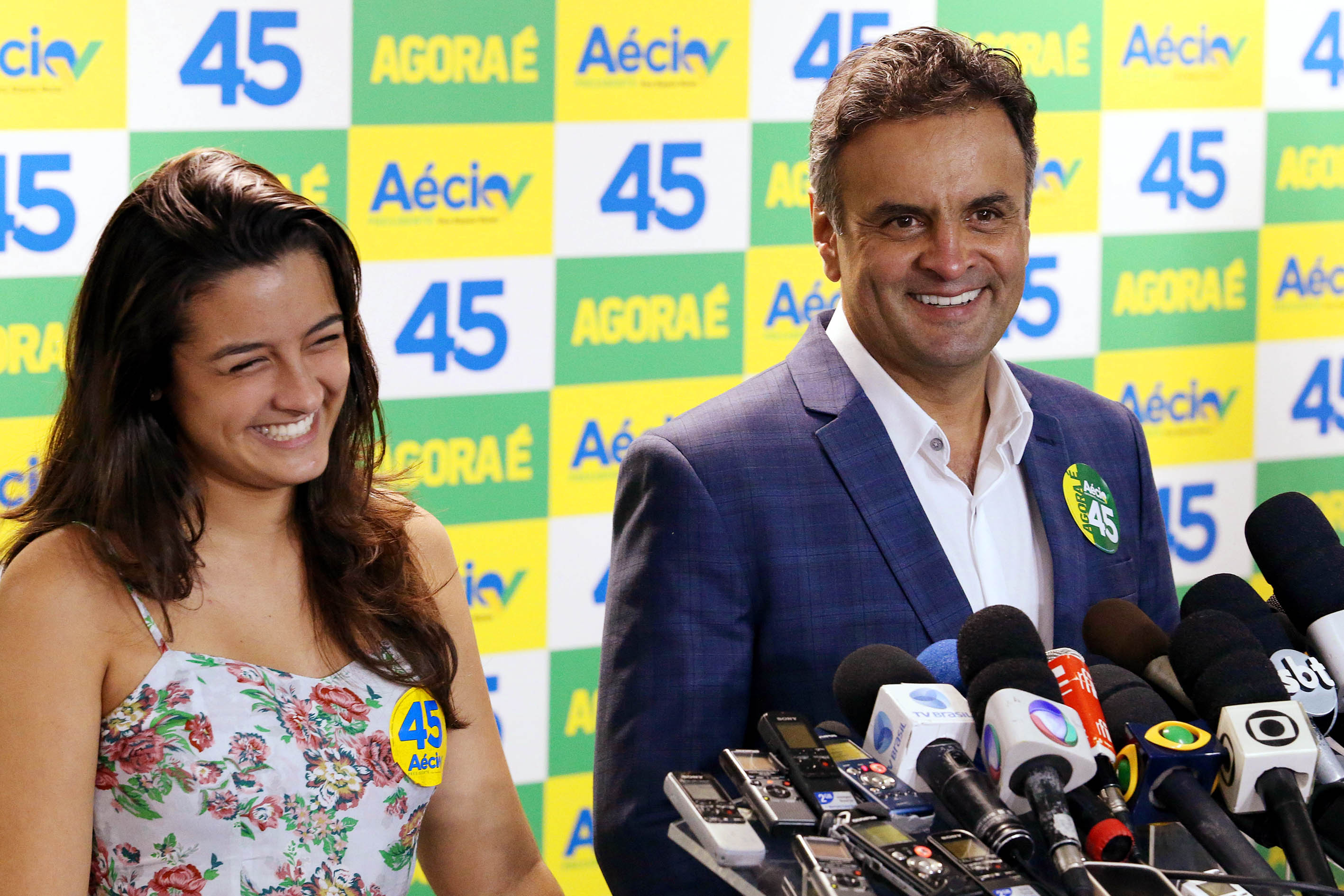 Aécio Neves e sua filha Gabriela em 23 de outubro de 2014.